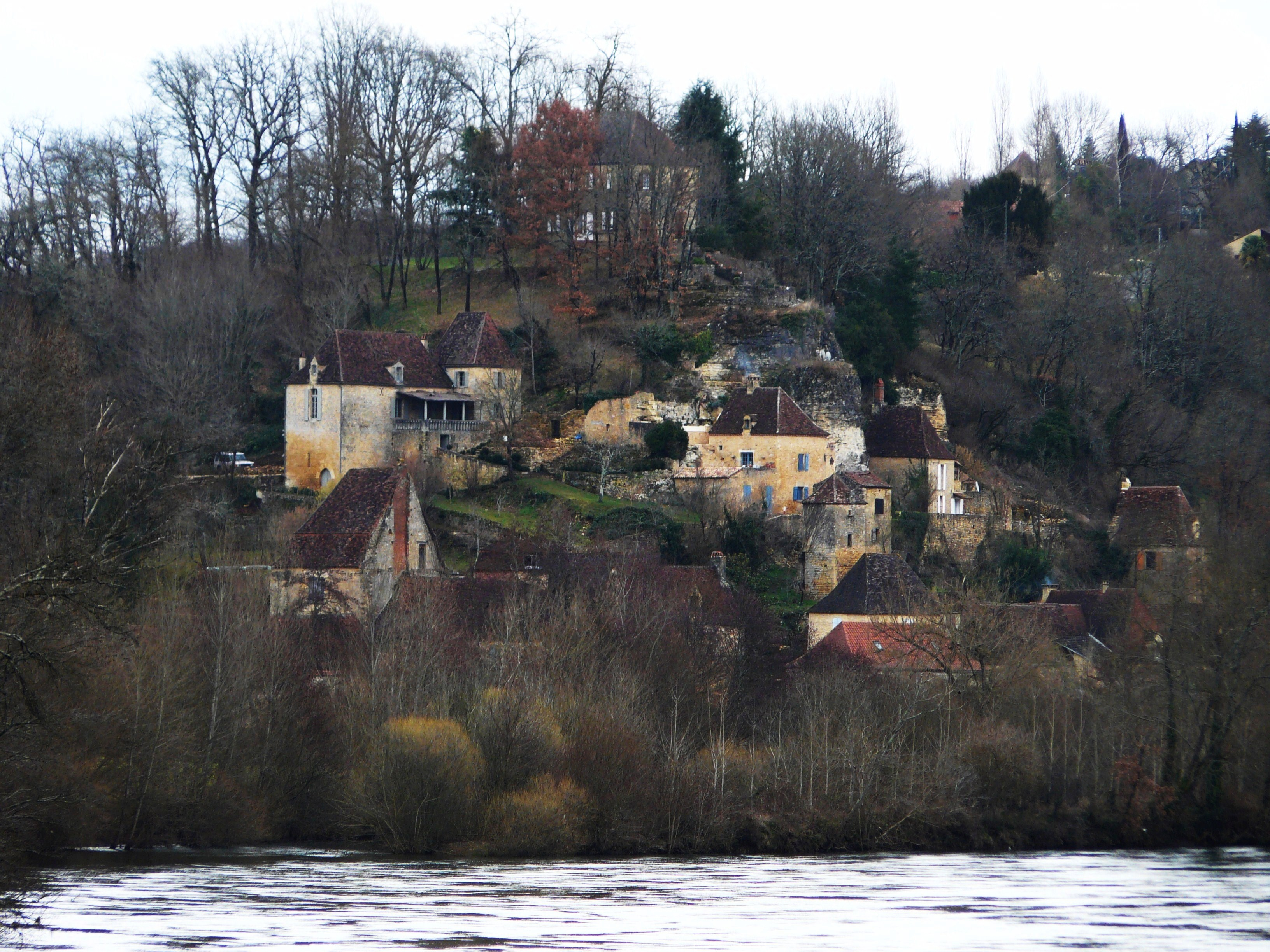 Le hameau de Bigaroque surplombant la Dordogne, Coux-et-Bigaroque, Dordogne, France